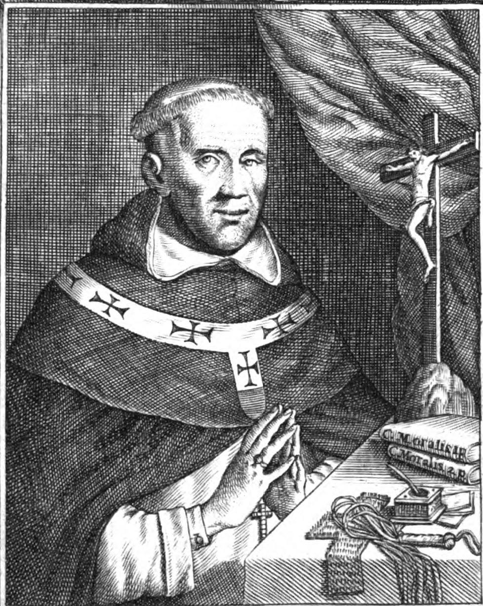 Grabado que representa fray Pedro de Tapia (1582-1657), obispo de Segovia, Sigüenza y de Córdoba, y arzobispo de Sevilla.